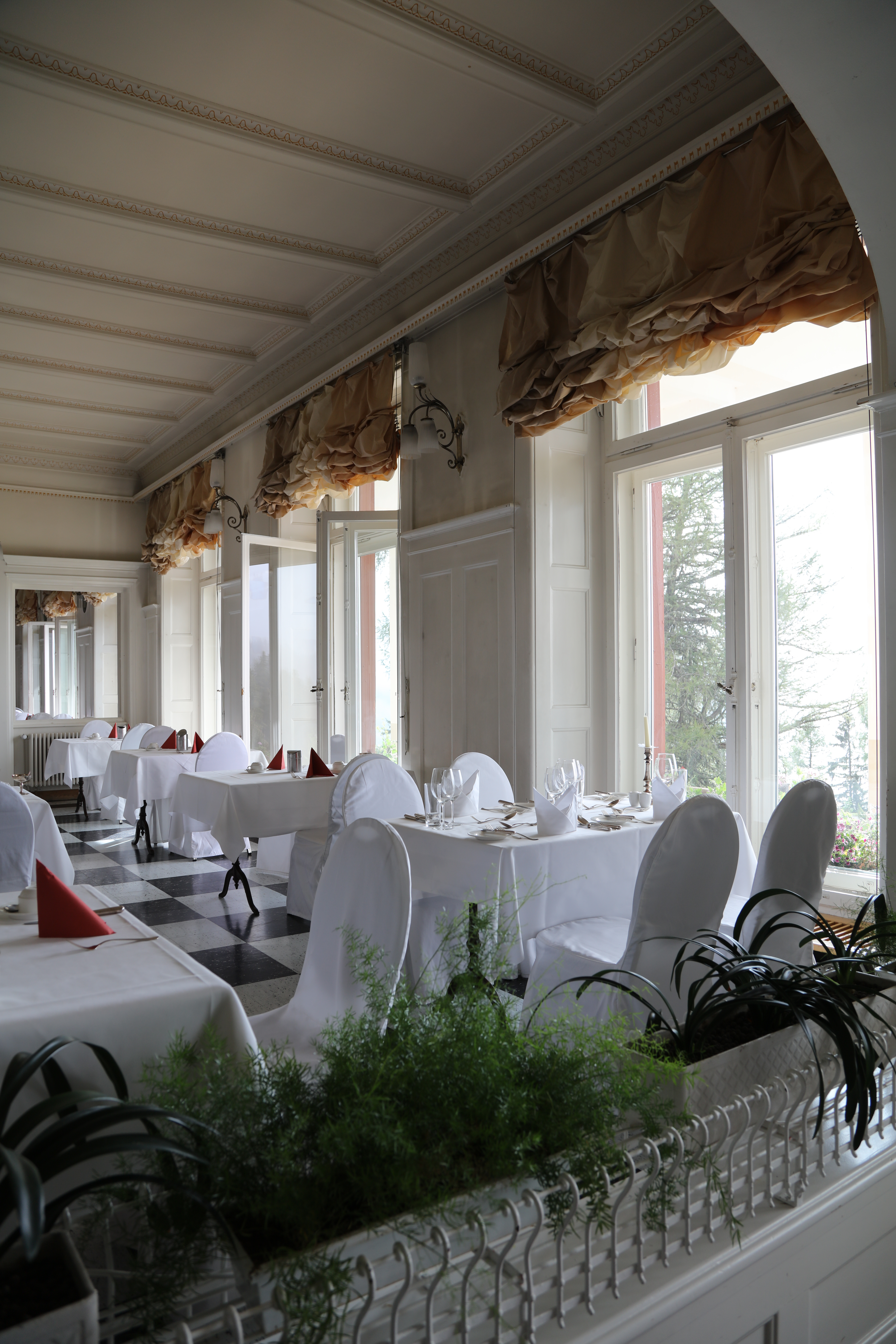 Der Speisesaal des ehelmaigen Sanatorium Schatzalp.